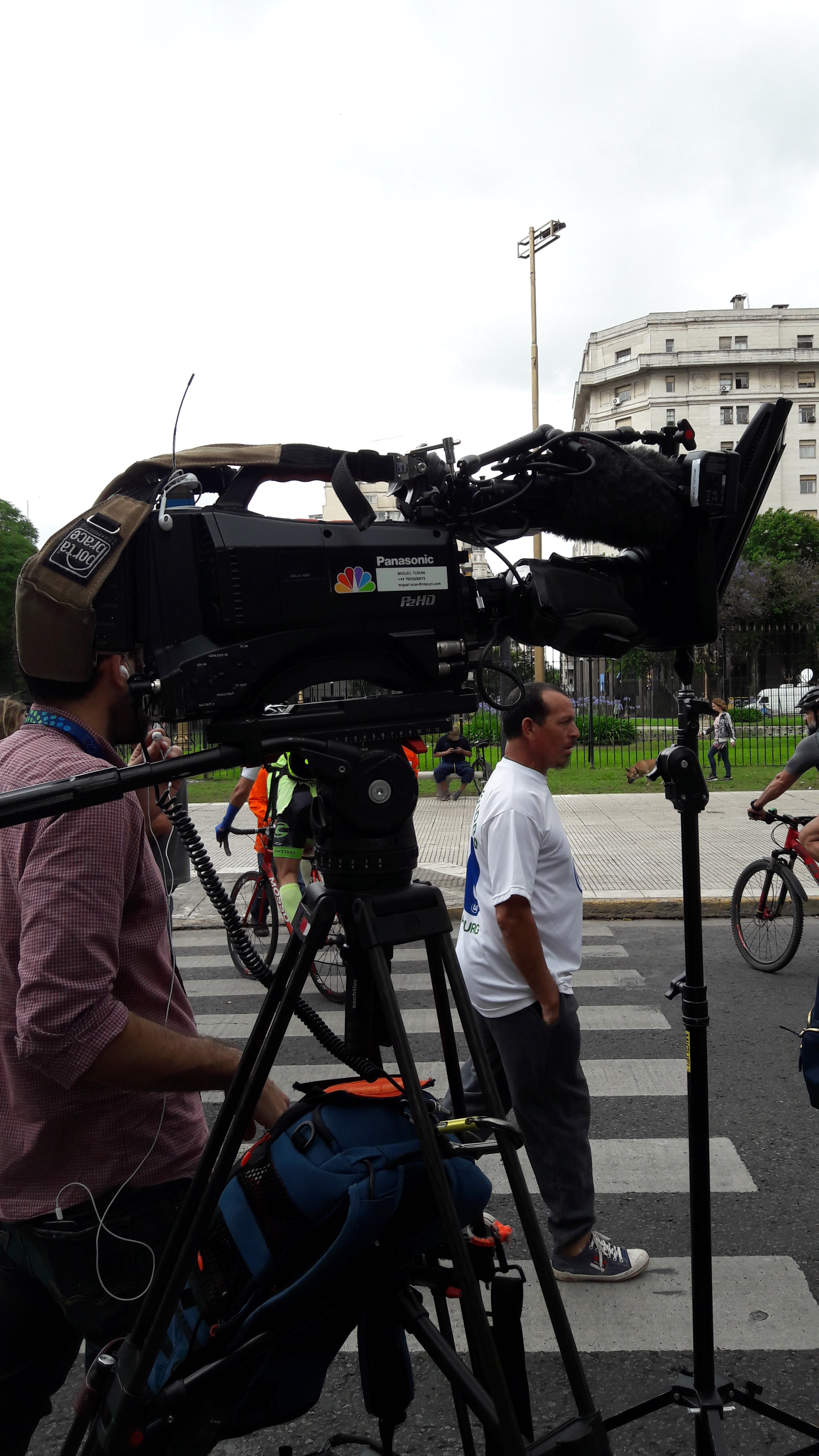 Manifestación contra el G20 y el FMI en Buenos Aires.